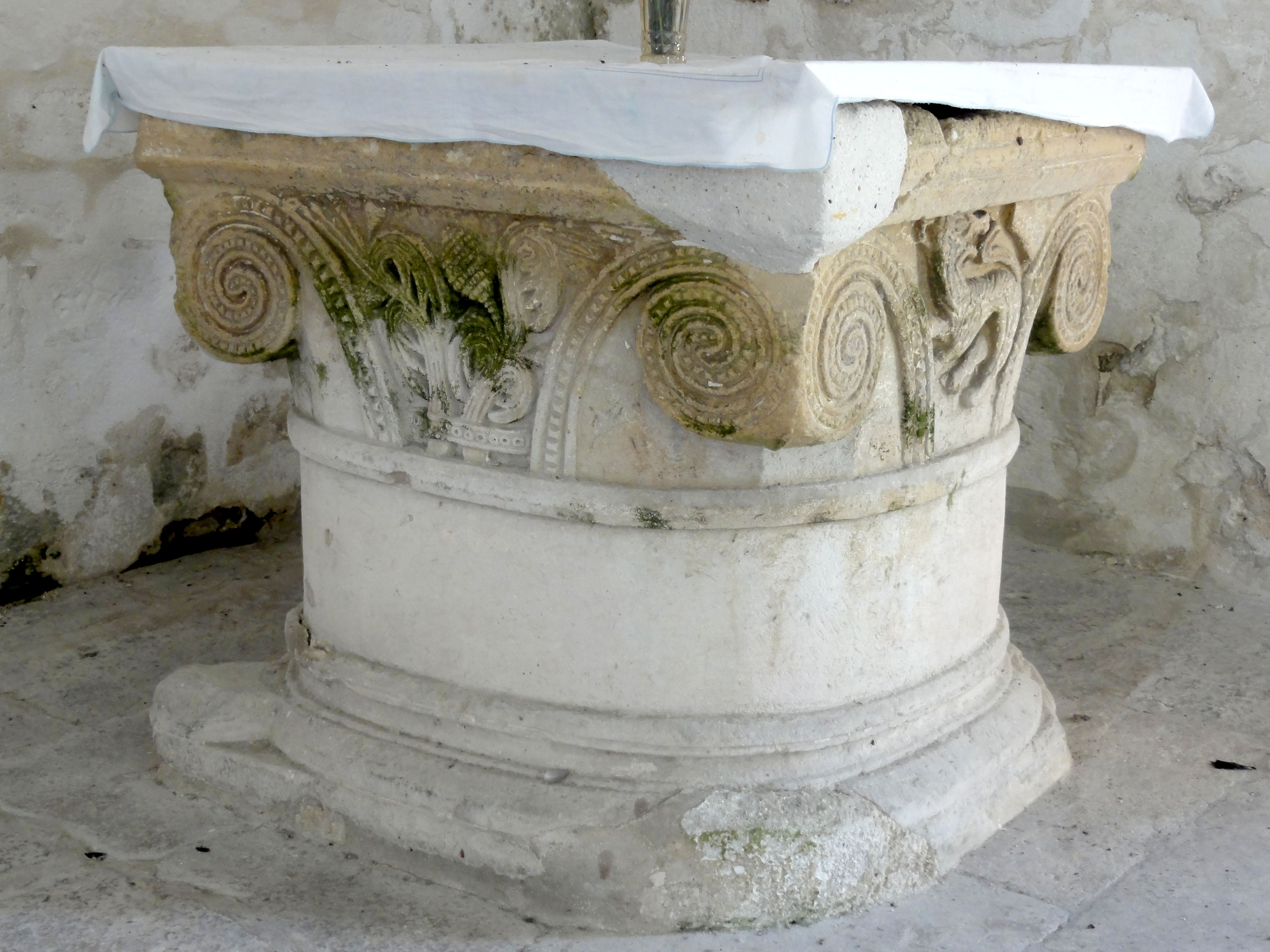 Nef, fonts baptismaux CMH.